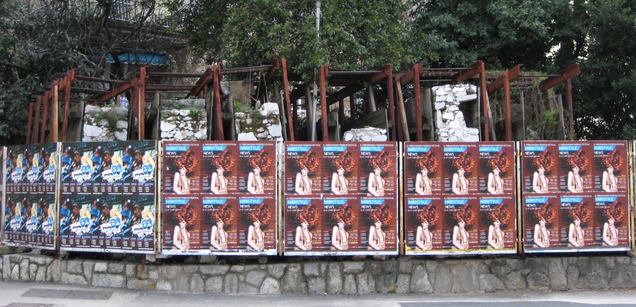 Gradski bedem u Rijeci